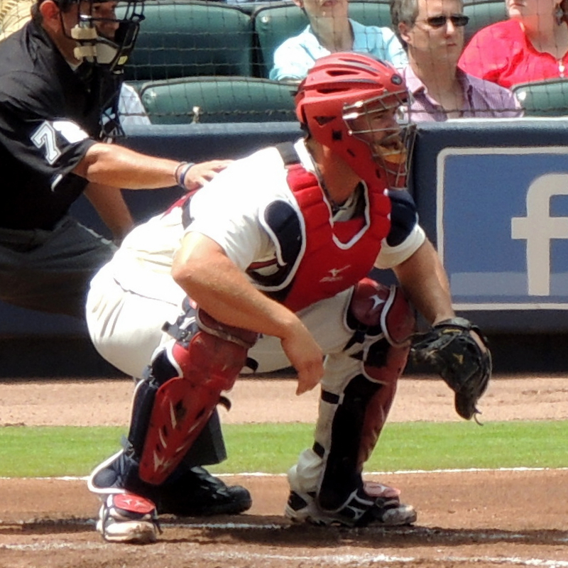 Evan Gattis